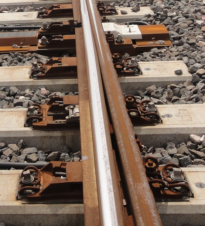 W-Weiche DB AG